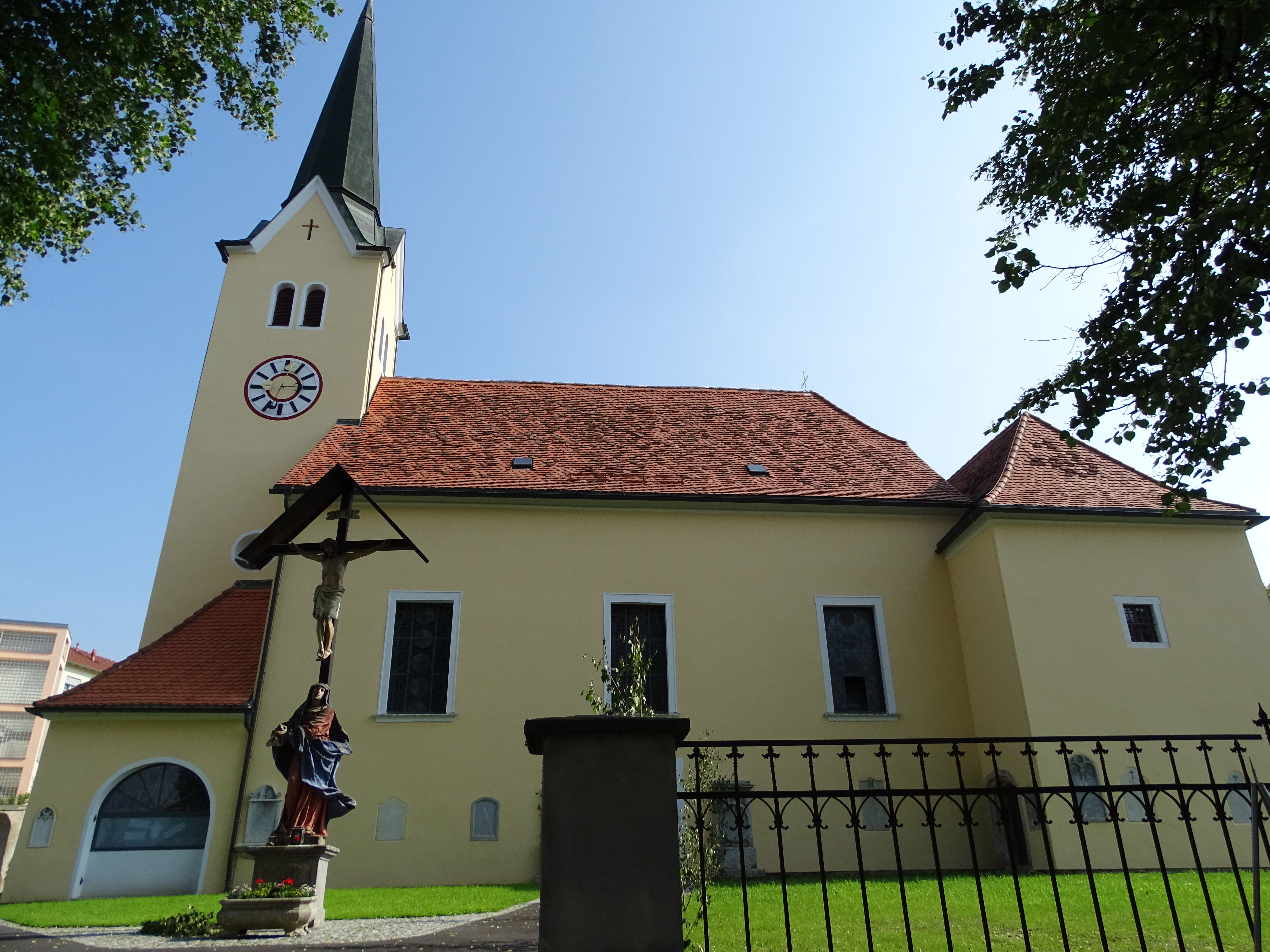 Kath. Pfarrkirche hl. Stephan und Kirchhof mit Umfassung und Friedhofskreuz